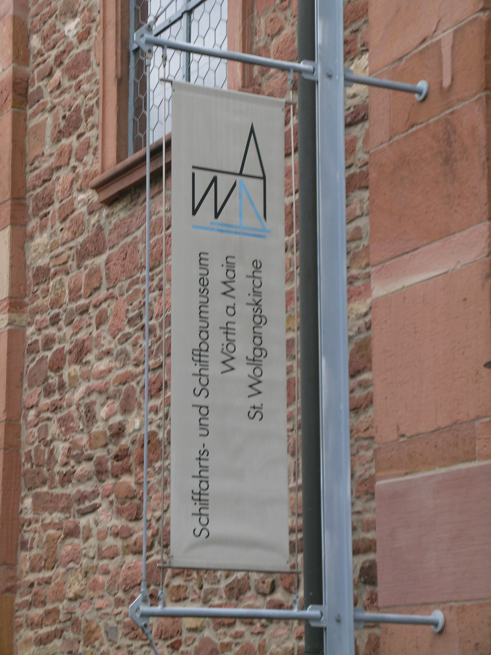 Museumseingang Schifffahrts- und Schiffbaumuseum Wörth am Main